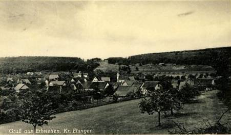 89584 Erbstetten: Alte Postkarte mit Ansicht